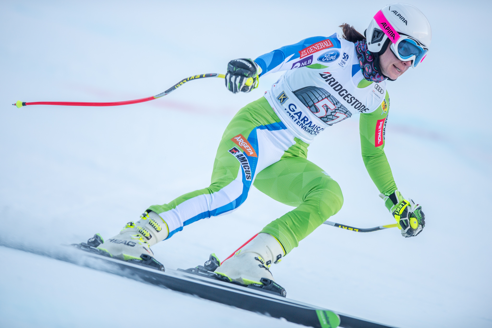 64. Kandahar Rennen,Audi FIS Ski Weltcup Garmisch-Partenkirchen,Damen Abfahrt,Kandahar,Ladies Downhill,Vanja Brodnik